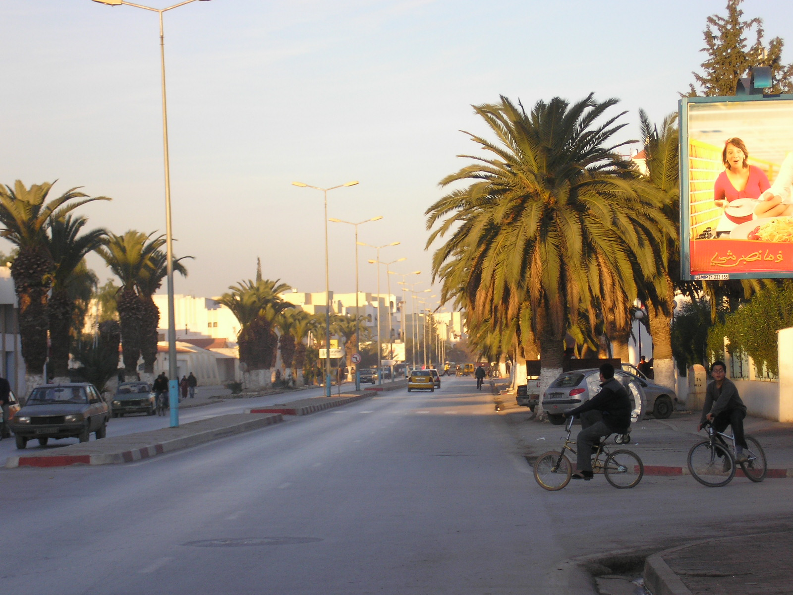 Image:Rue badja des Palmiers à Jendouba "BADJA" ; )